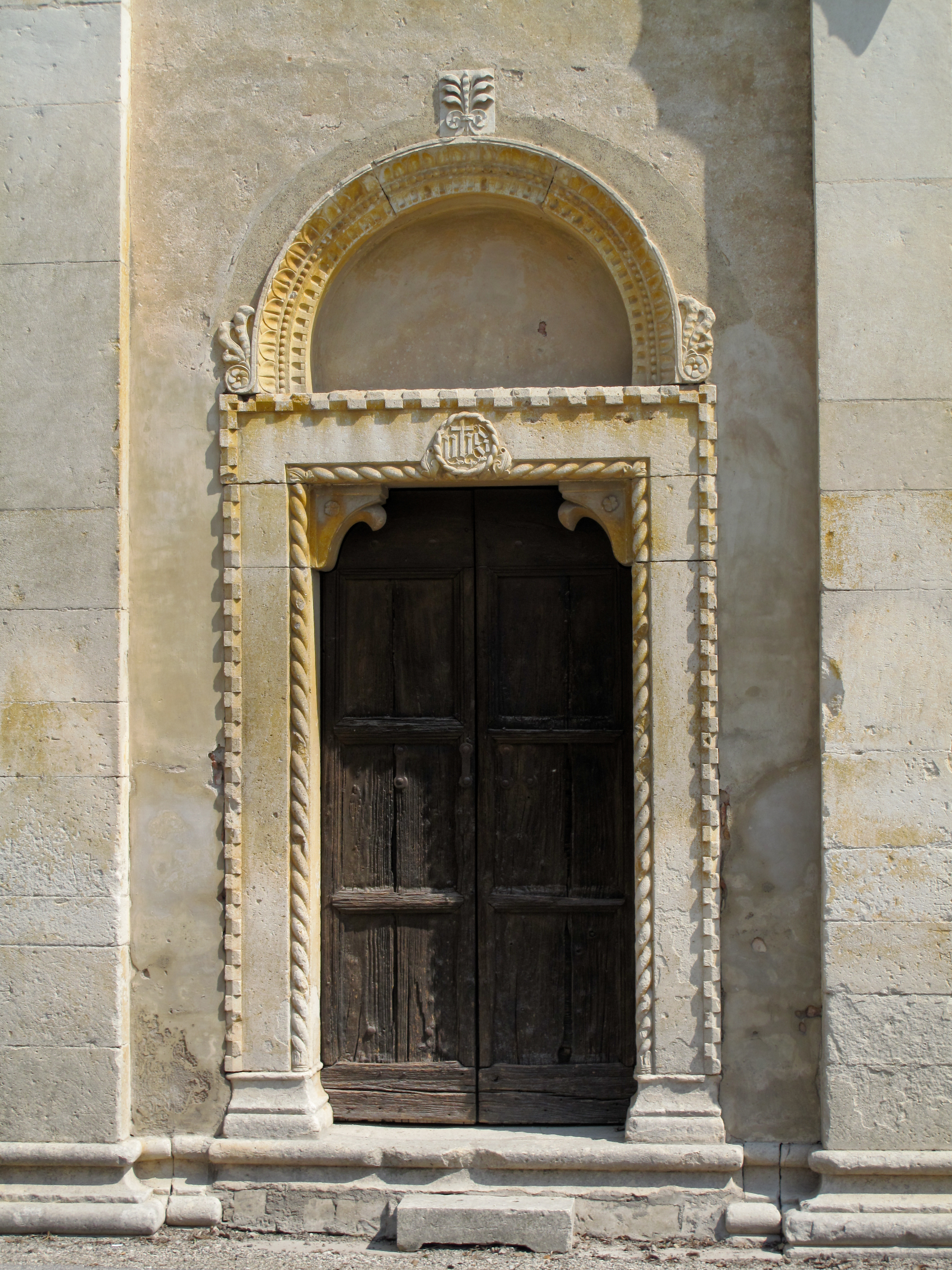 Portale della cappella di Villa Trento